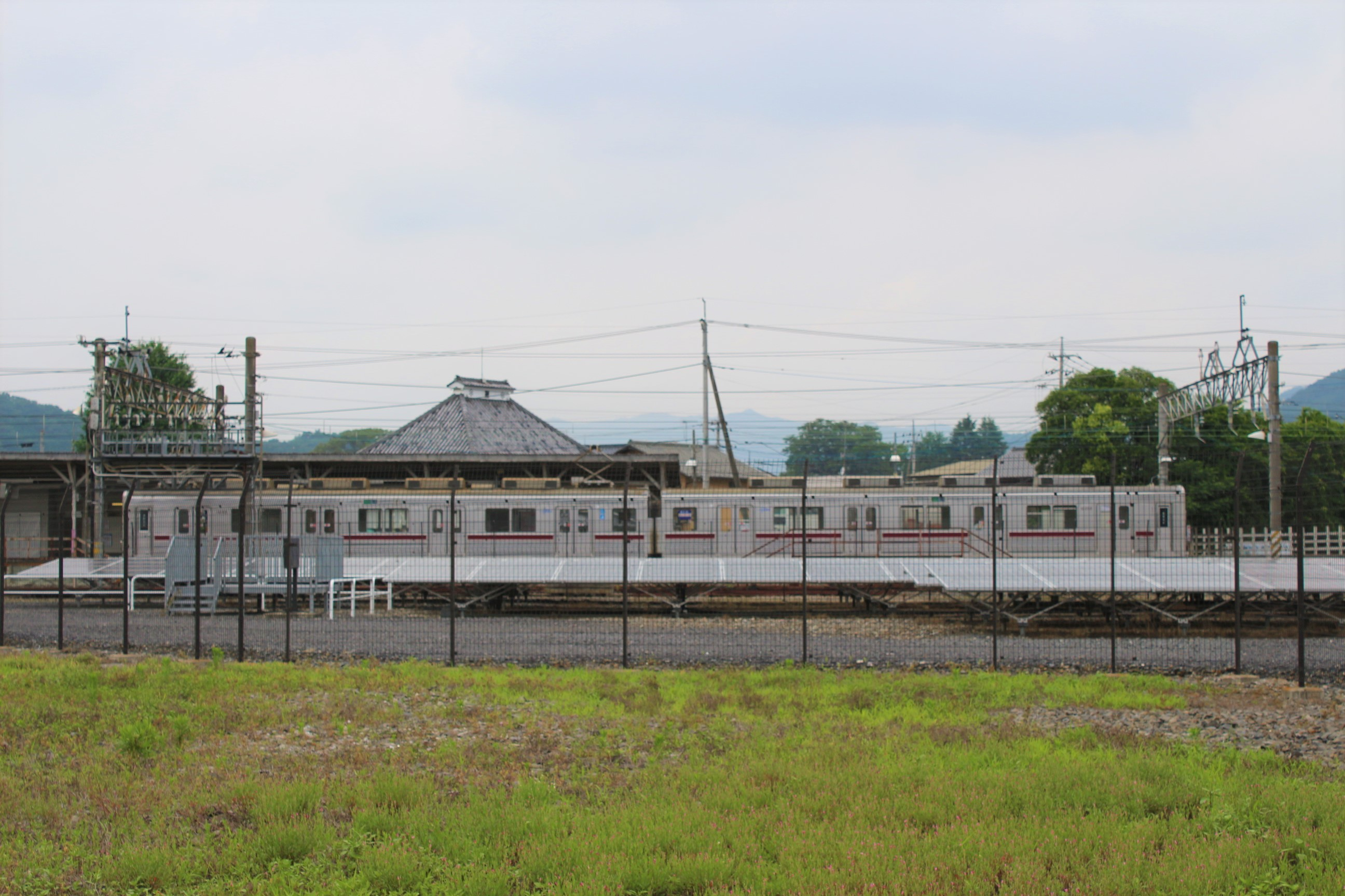 葛生駅構内にある「葛生太陽光発電所」 Canon EOS Kiss X7i